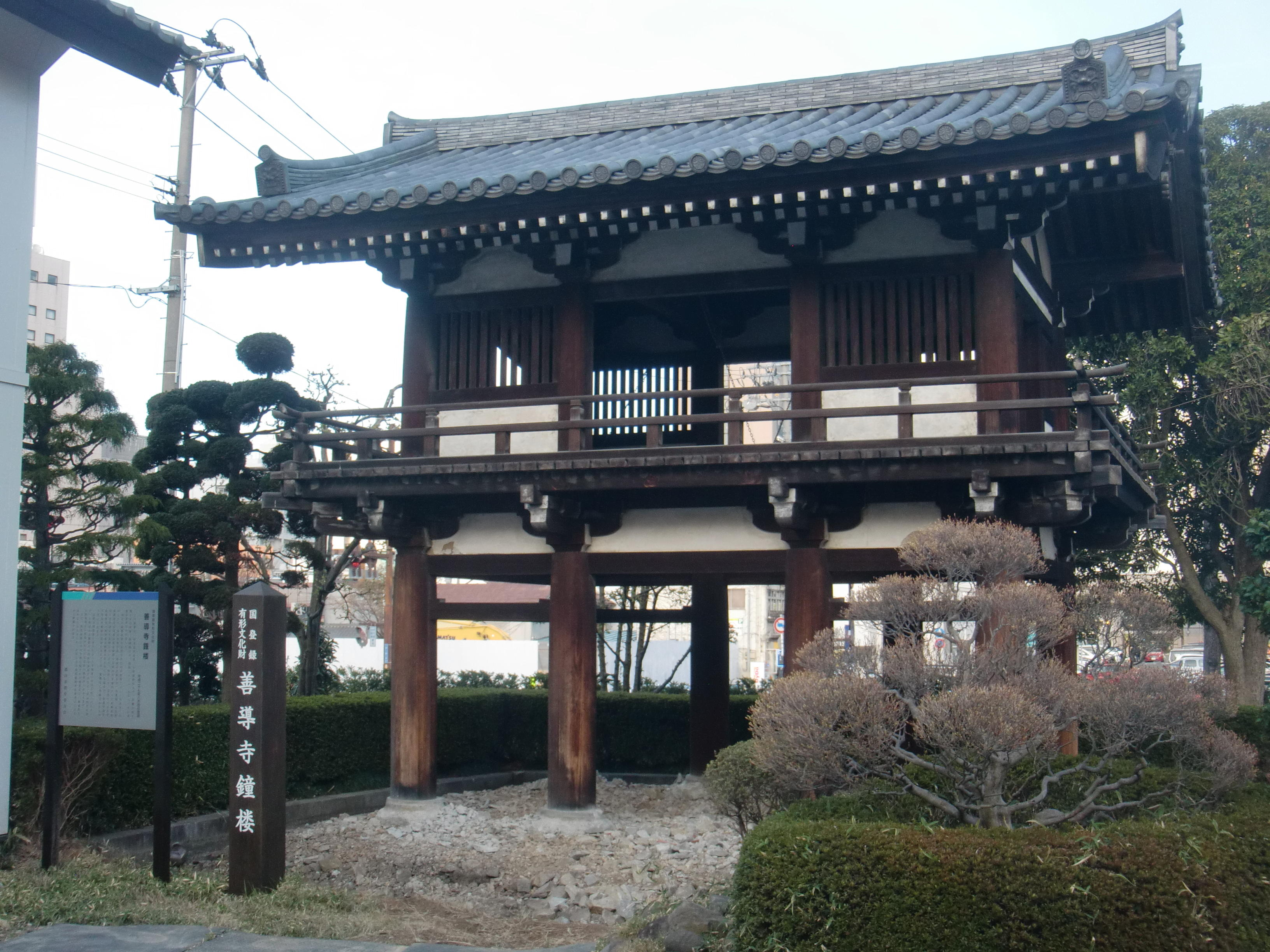 郡山市 善導寺 鐘楼 通常時